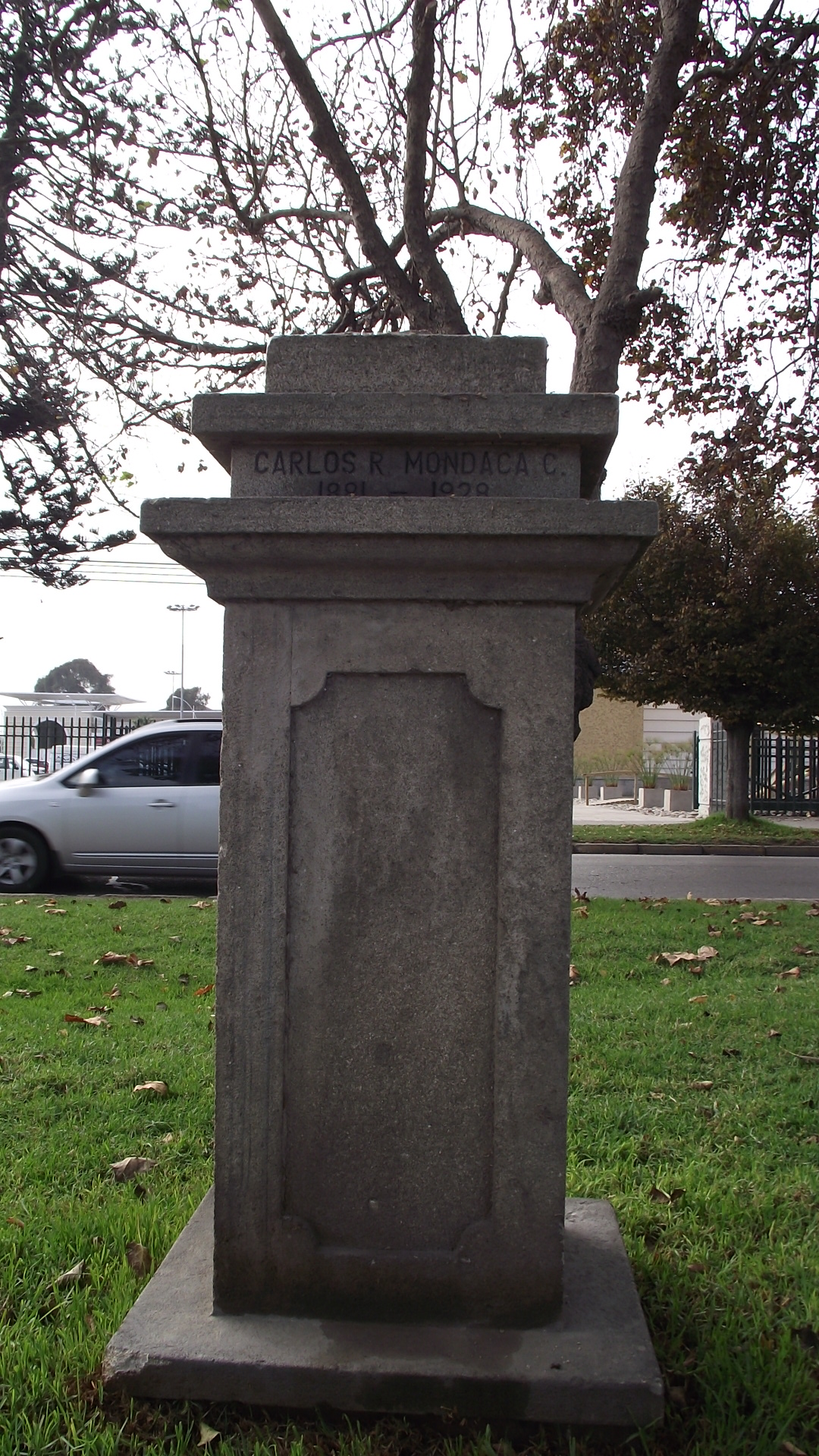 Aquí debería estar un busto de Carlos Mondaca Cortés